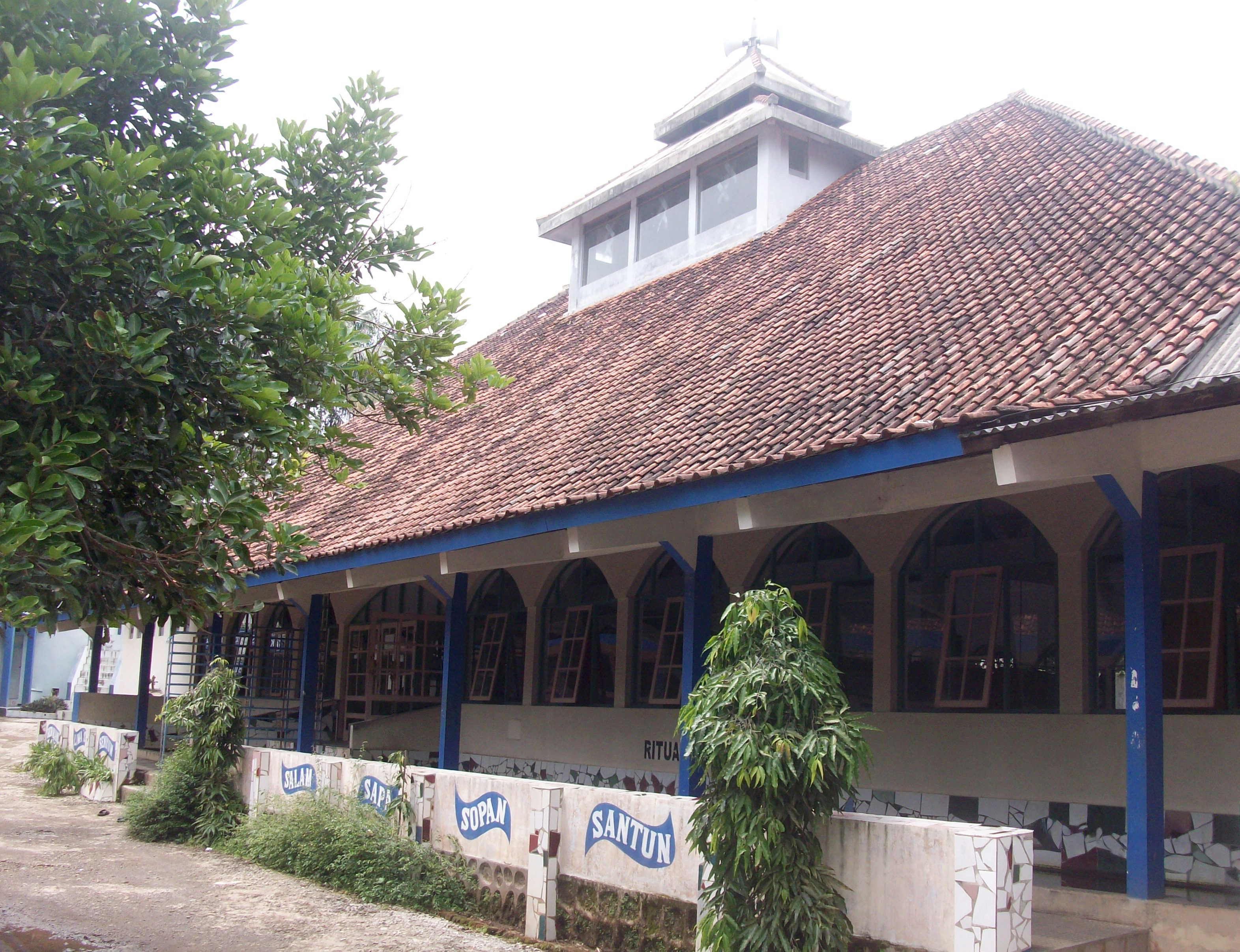 Masjid Ar-Rosyad, Ponpes 'Ainurrafiq